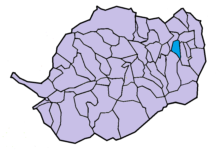 Espirà de Conflent a la seva comarca, a partir del mapa municipal del Conflent de lliure disposició adaptat al Nomenclàtor toponímic aprovat el 2007